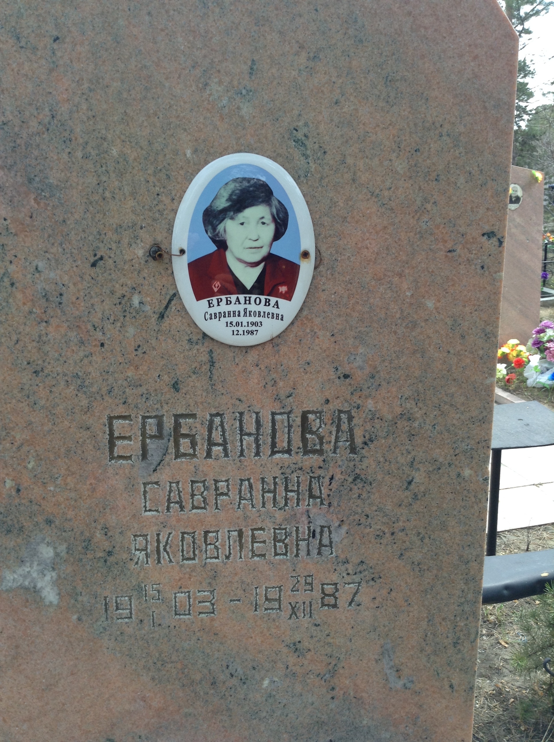 Ербанова (Малахирова) Савранна Яковлевна